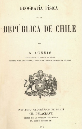 Portada de la Geografía Física y Política de Chile de Pedro José Amado Pissis publicado en 1875